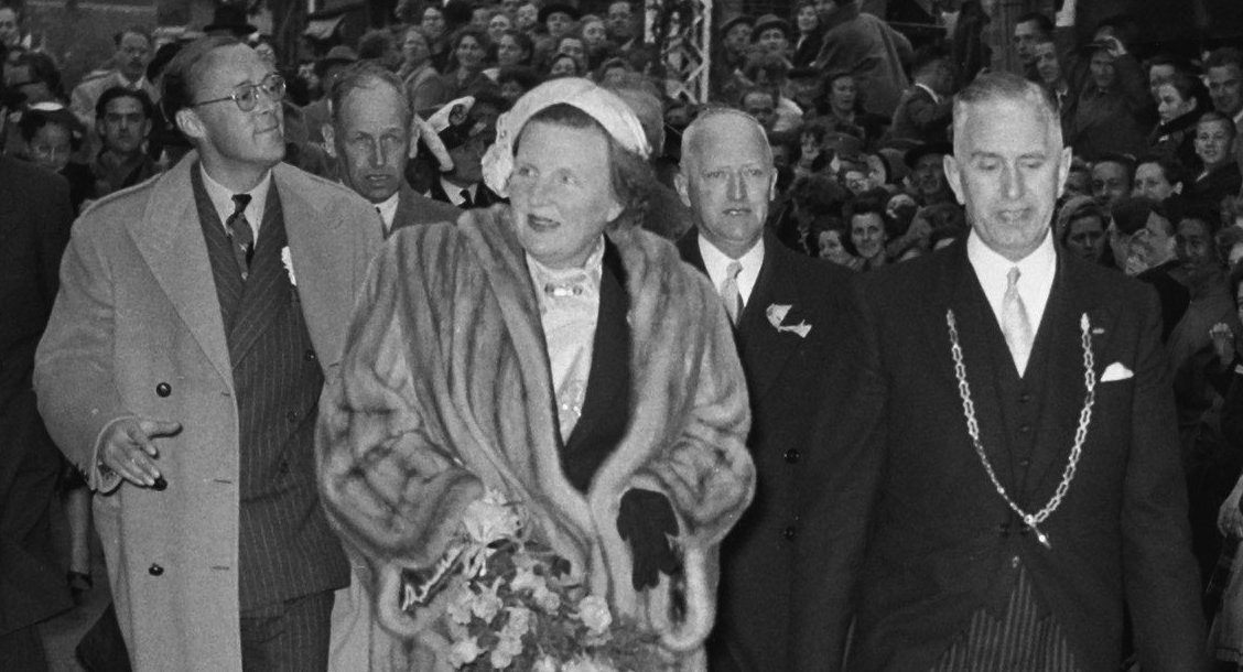 Collectie / Archief : Fotocollectie Anefo Reportage / Serie : [ onbekend ] Beschrijving : Koningin Juliana en prins Bernhard brengen een bezoek aan 15 gemeentes in oostelijk Zuid-Holland. Het koninklijk paar loopt met burgemeester H.H.C. Vos door de Voorstraat in Woerden. Datum : 20 mei 1954 Locatie : Utrecht, Woerden Trefwoorden : bezoeken, burgemeesters, koninginnen, koninklijk huis, prinsen Persoonsnaam : Bernhard, prins, Juliana, koningin, Vos H.H.C. Fotograaf : Noske, J.D. / Anefo Auteursrechthebbende : Nationaal Archief Materiaalsoort : Negatief (zwart/wit) Nummer archiefinventaris : bekijk toegang 2.24.01.03 Bestanddeelnummer : 906-4735